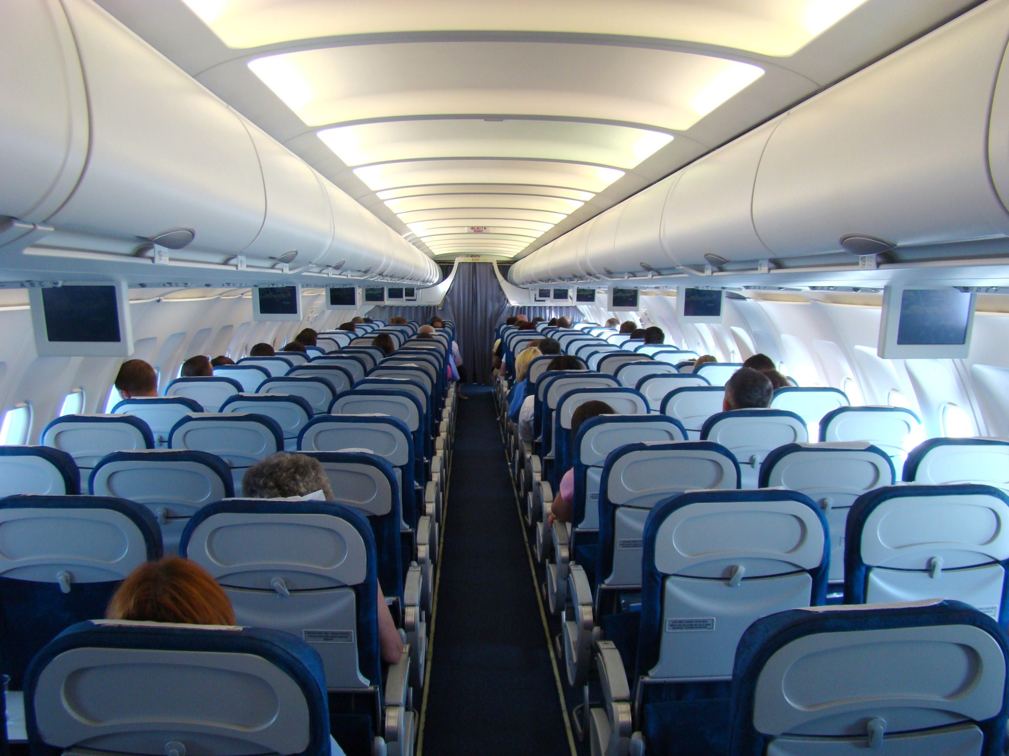 Interiorul aeronavei Airbus A318 „Smaranda Brăescu” aparținând companiei TAROM